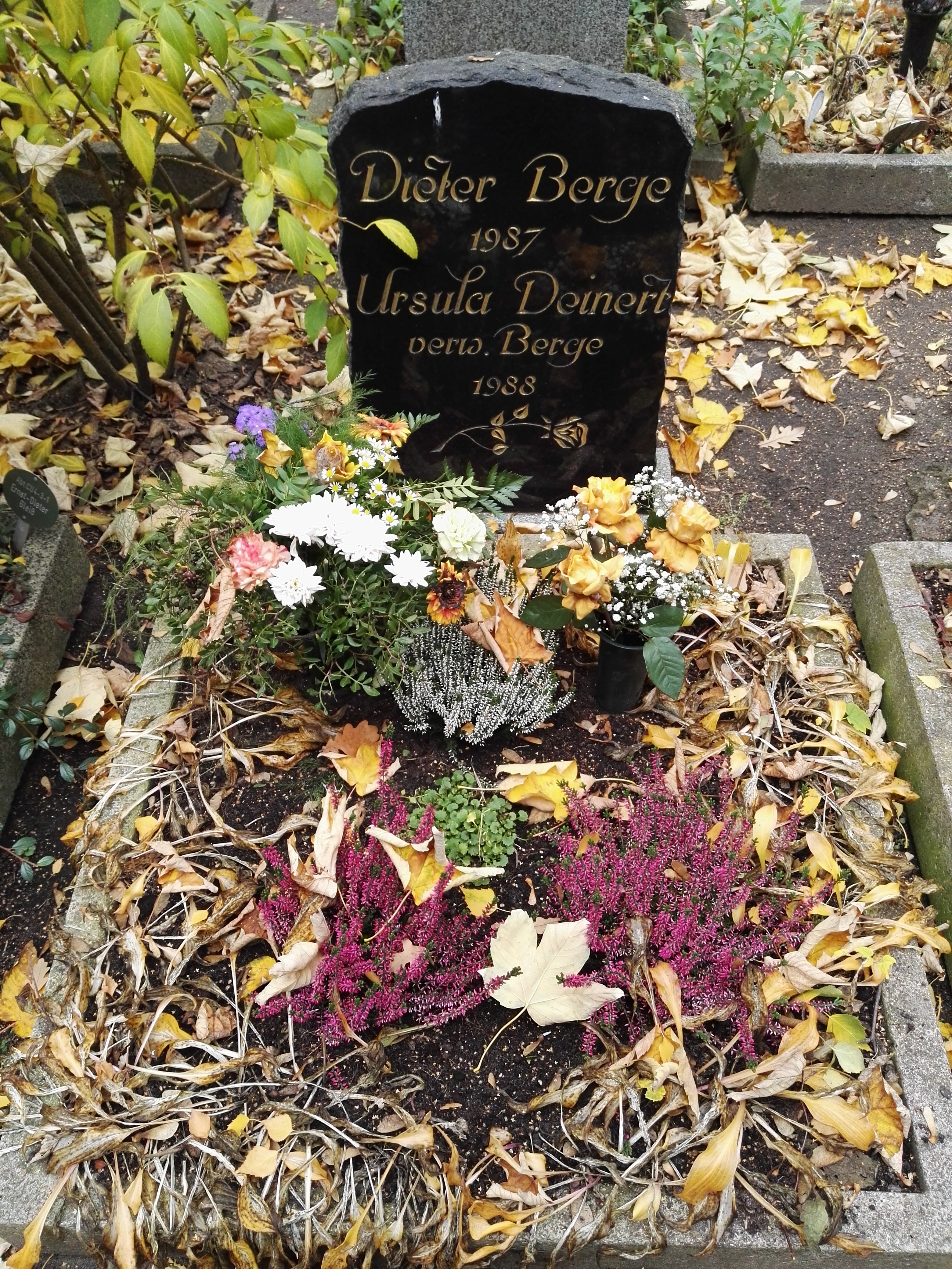 Grab von Ursula Deinert und Dieter Berge auf dem Friedhof der Dorotheenstädtischen und Friedrichswerderschen Gemeinden in Berlin-Mitte